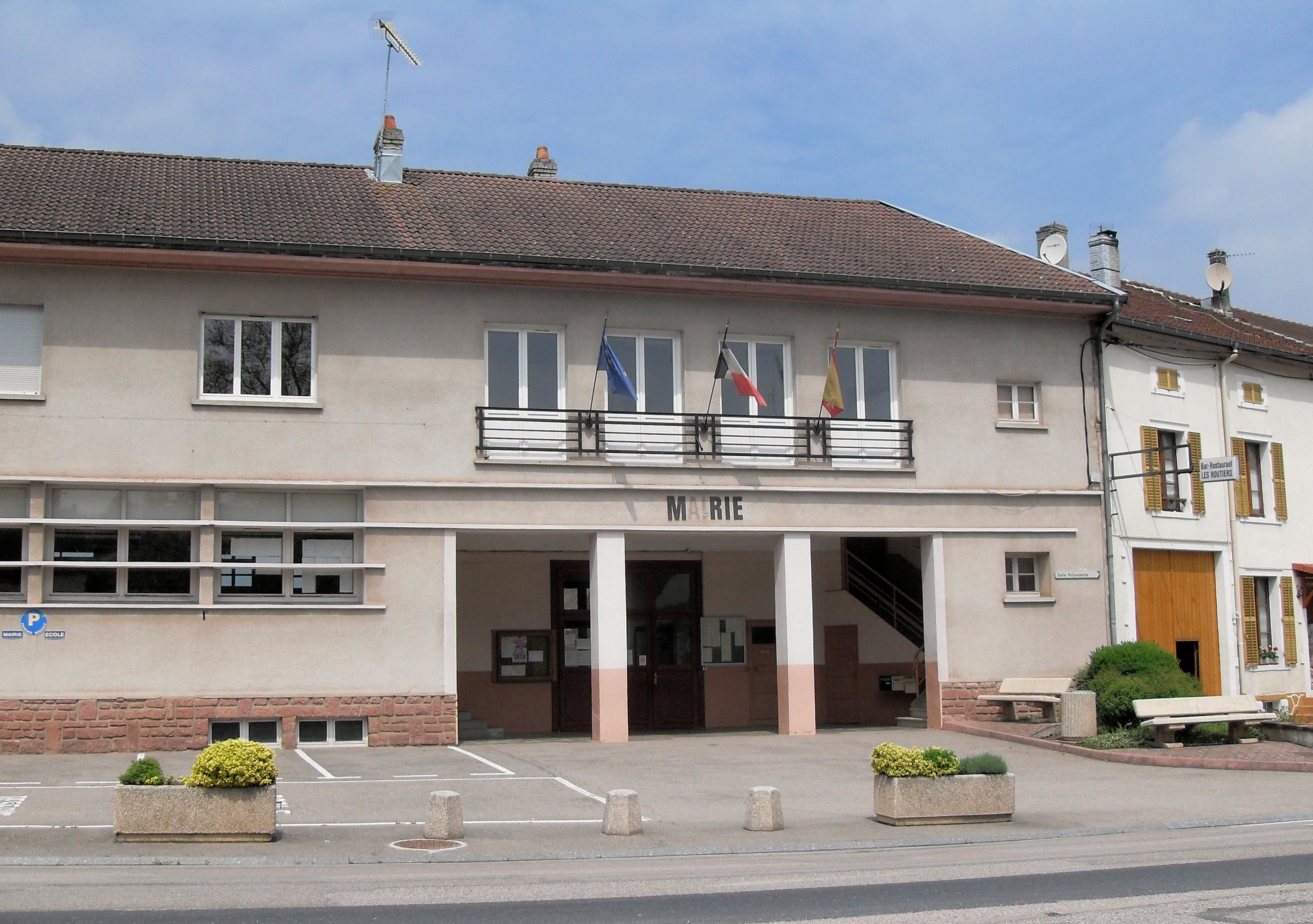 La mairie deMénil-sur-Belvitte